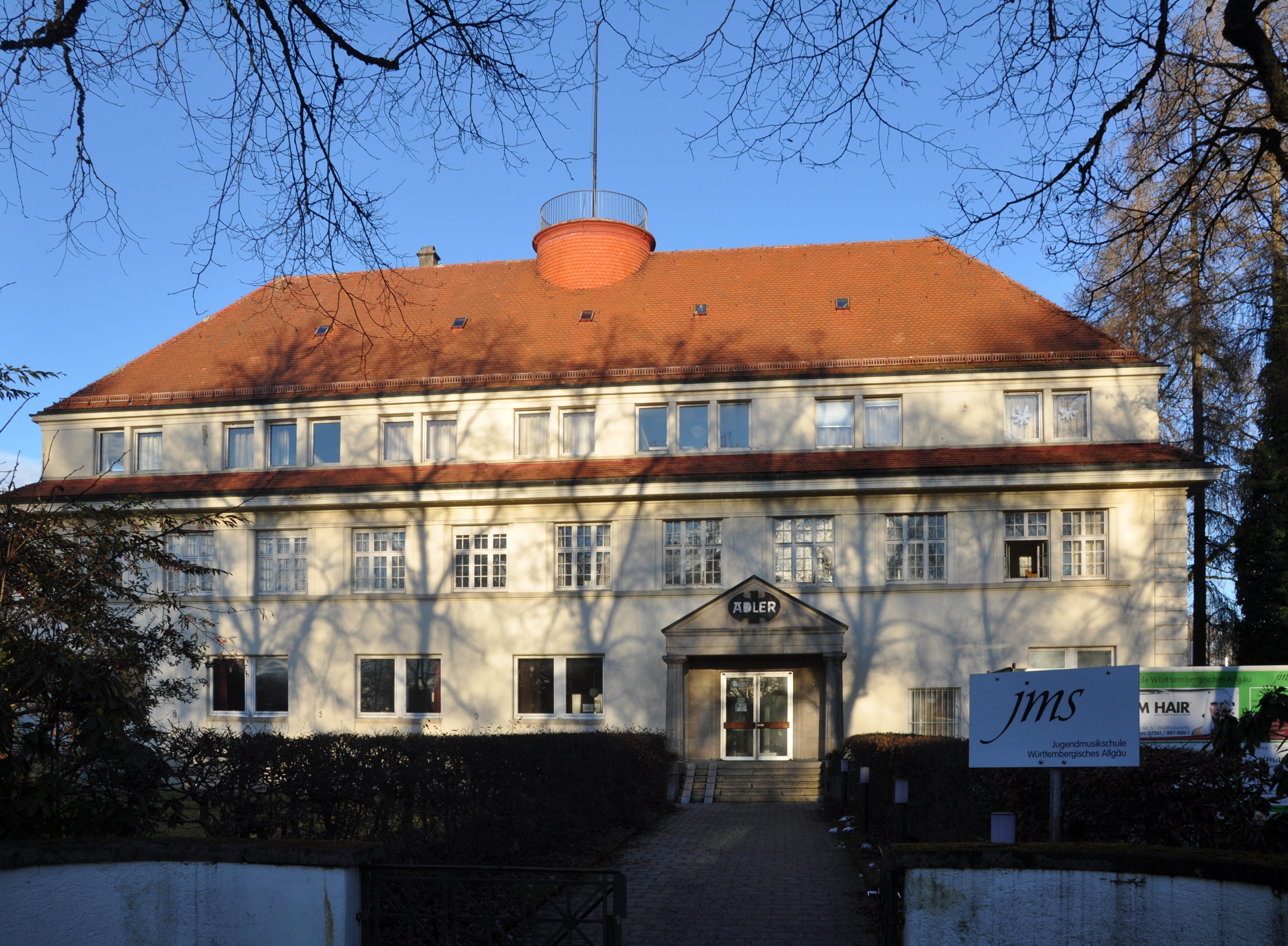 Wangen im Allgäu, GEG-Gebäude